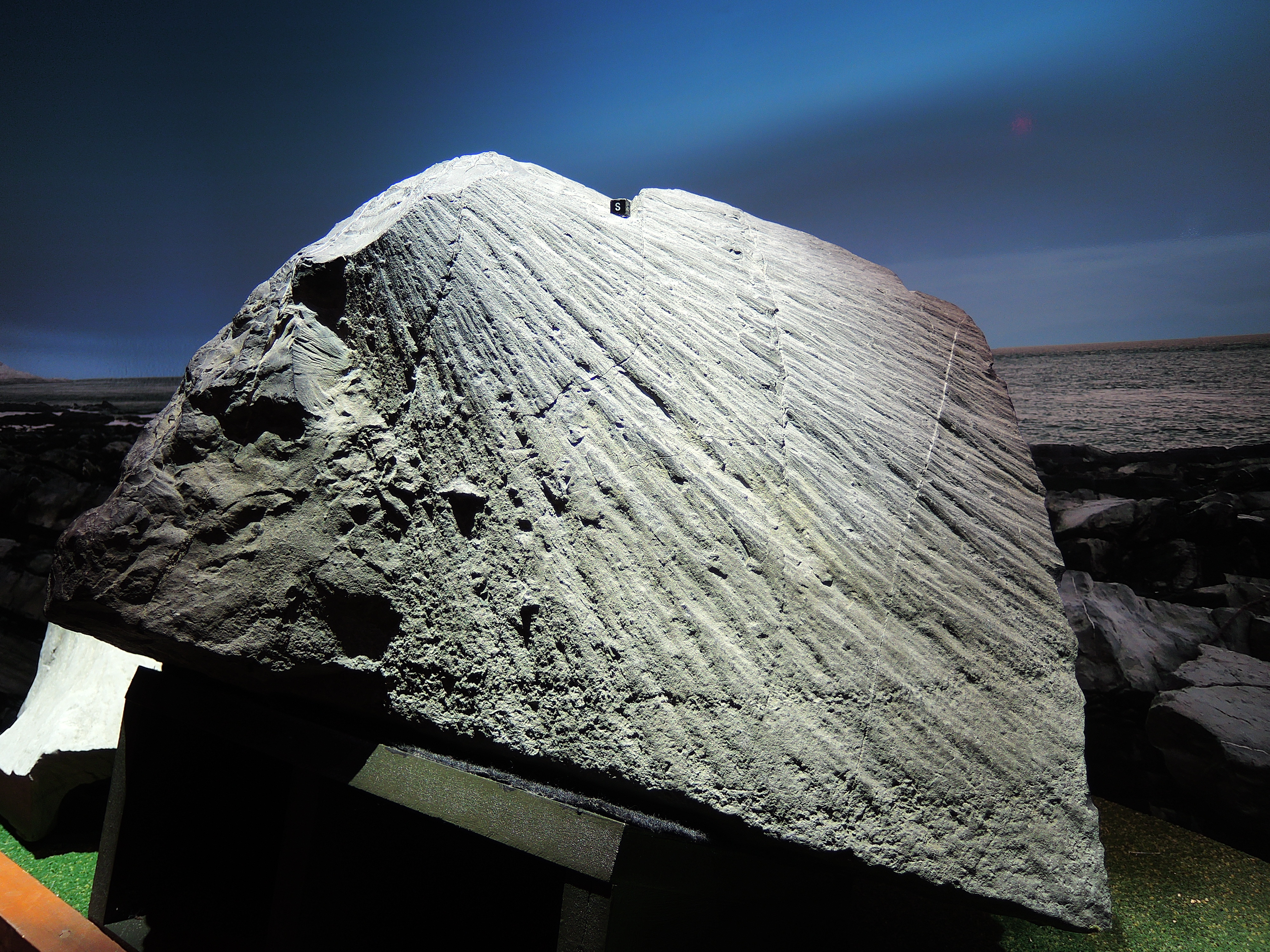 Cône de percussion (shatter cone) de l'Astroblème de Charlevoix, exposé à l'Observaoire de l'Astroblème de Charlevoix.